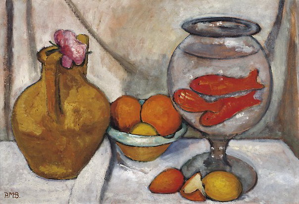 Paula Modersohn-Becker (1876-1907), Still Life with Fish Bowl , c.1906. Oil on canvas, 50.5 x 74 cm, Von der Heydt Museum, Wuppertal, Germany.jpg: натюрморт в акваріумом